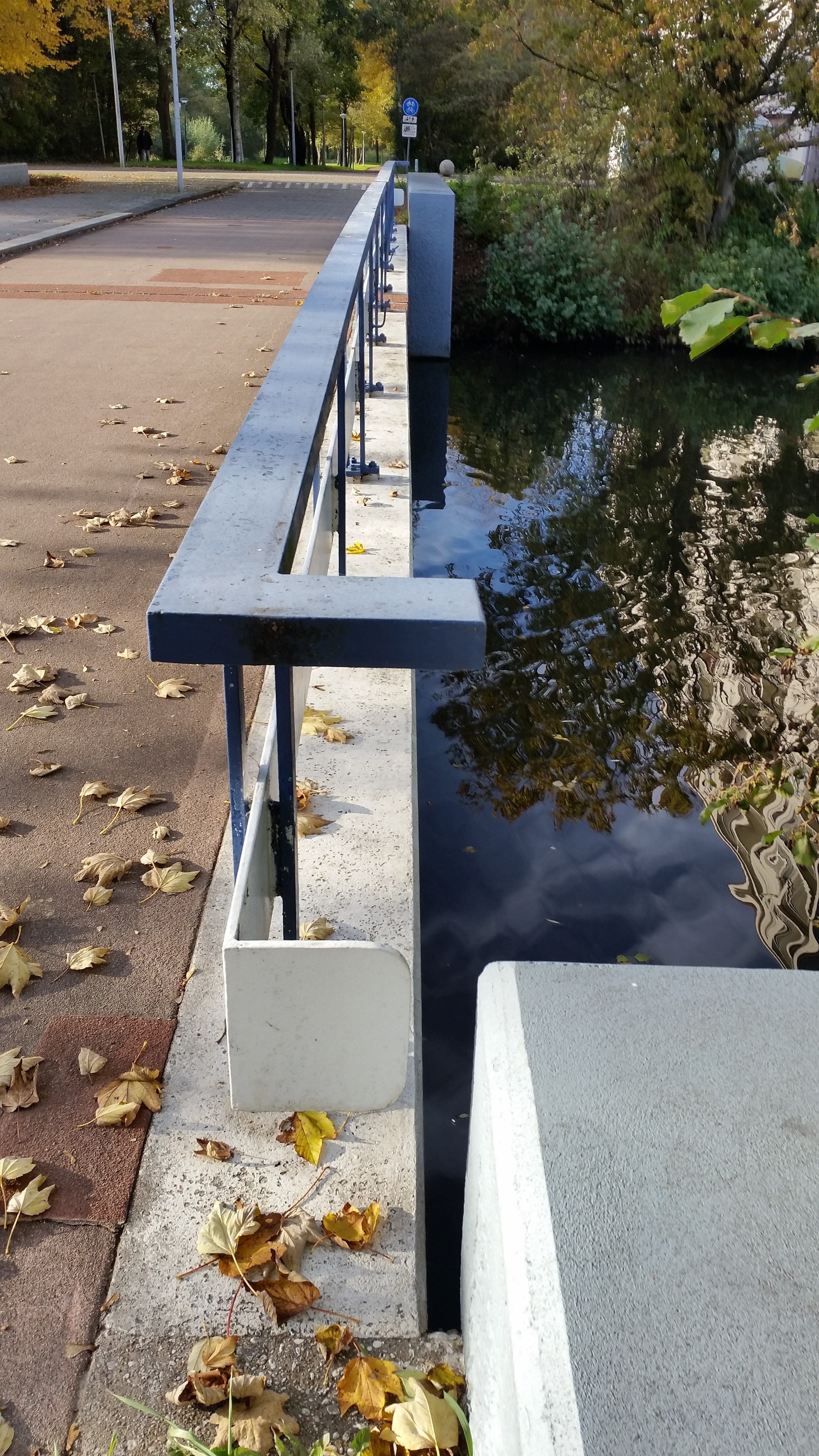 Brug 980 in Amsterdam-Noord, afwerking van de leuning